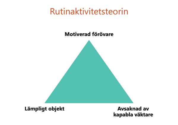 Detta är en figur på hur rutinaktivitetsteorin kan illustreras.